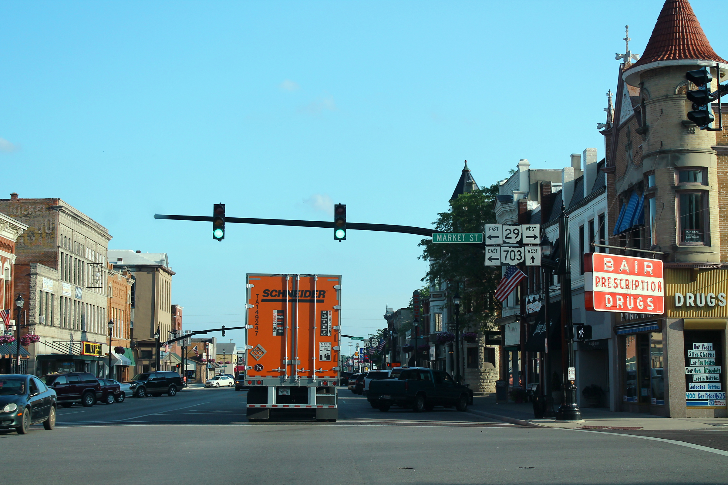 Celina, Ohio